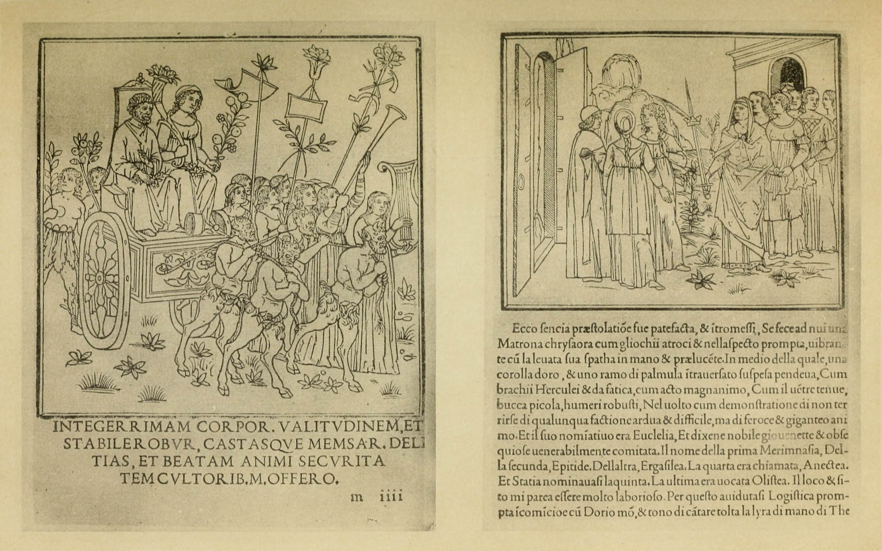 DEUX PAGES DU SONGE DE POLIPHILE I. — Triomphe de Vertumne et de Pomone. « … Telles les Hamadryades et les chanteuses d’Hyménées dansaient autours de Vertumne fleurs, du front ceint de roses safranées, le giron plein de fleurs amies de la saison que ramène le Bélier laineux. Il était assis en triomphe sur un chariot fort antique, trainé par quatres faunes cornus : auprès de lui sa chère Pomone, couronné de fruits et laissant pendre la masse de sa chevelure d’or. En avant du char, une femme élevait un trophée de sarcloirs, de fourches et de faucilles, avec cette inscription peinte sur un cartouche : « La parfaite santé du corps, des muscles vigoureux, les chastes plaisirs de la table, l’heureuse sécurité de l’esprit, sont les dons que je fais à mes dévots. » II. — Poliphile rencontre la matrone Enclélie. Euclélie (la gloire) est reconnaissable à son visage sévère et à son glaive où pendent une couronne et une palme. Derrière cette imposante figure, s'avancent ses suivantes, Mérimnasia, Epitidis, Ergasilée, Anactéa, Statia et Olistée.